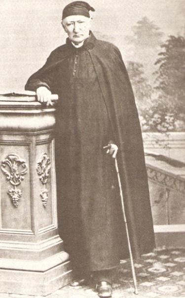 Déan Juan Gualberto Valdivia